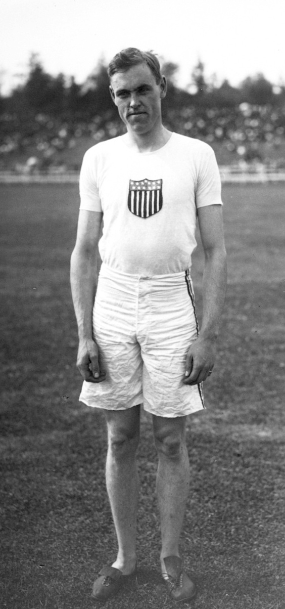 23-7-12, Reims, Caldwell, américain, 800 mètres [portrait] : [photographie de presse] / [Agence Rol]